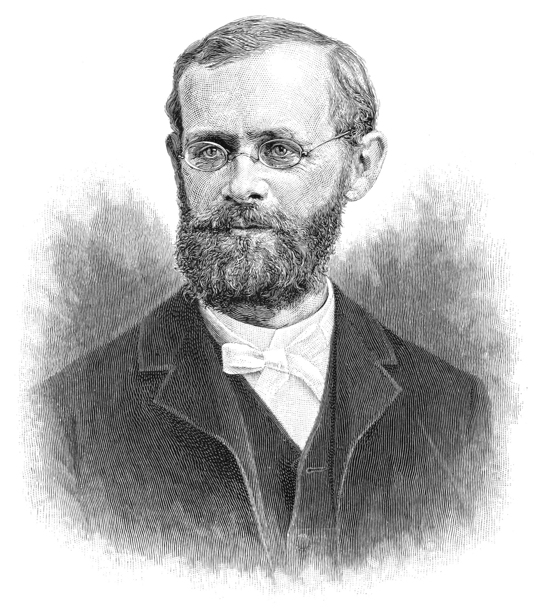 Cleveland Abbe